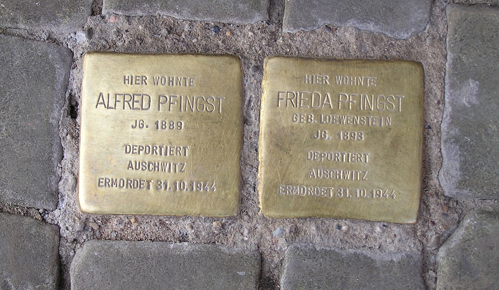 Projekt "Stolpersteine Minden" in Minden, Nordrhein-Westfalen. Die Stolpersteine sind eine Erinnerung an die deportierten und meist getöteten jüdischen Bürger Mindens in der Zeit des Nationalsozialismus. Diese beiden Steine sind in der Bäckerstraße am Wesertor eingelassen. Inschrift linker Stein: HIER WOHNTEALFRED PFINGST JG. 1889DEPORTIERT AUSCHWITZERMORDET 31.10.1944 Inschrift rechter Stein: HIER WOHNTEFRIEDA PFINGST GEB. LÖWENSTEIN JG. 1893DEPORTIERT AUSCHWITZERMORDET 31.10.1944